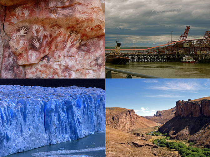 Montage de fotos de la Provincia de Santa Cruz